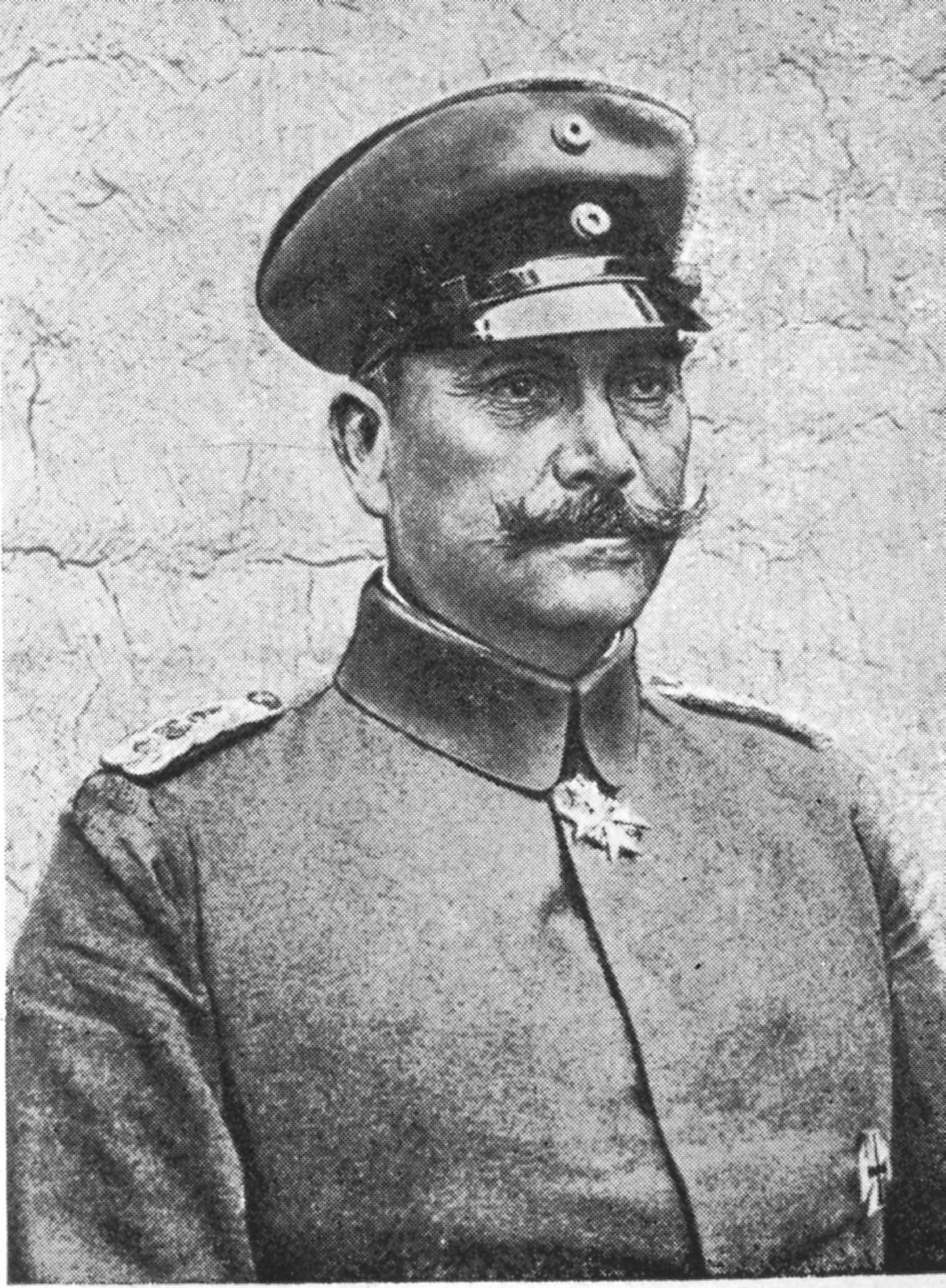 Oberst Bruchmüller, Rheinisches Fußartillerie-Regiment Nr. 8 von Preußen.